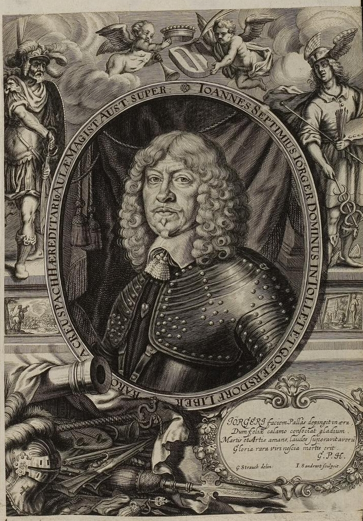 Grafik aus dem Klebeband Nr. 1 der Fürstlich Waldeckschen Hofbibliothek Arolsen Motiv: Hans Septimius Jörger von Tollet (1594–1662), Kupferstecher, Radierer, Kunstsammler in Nürnberg